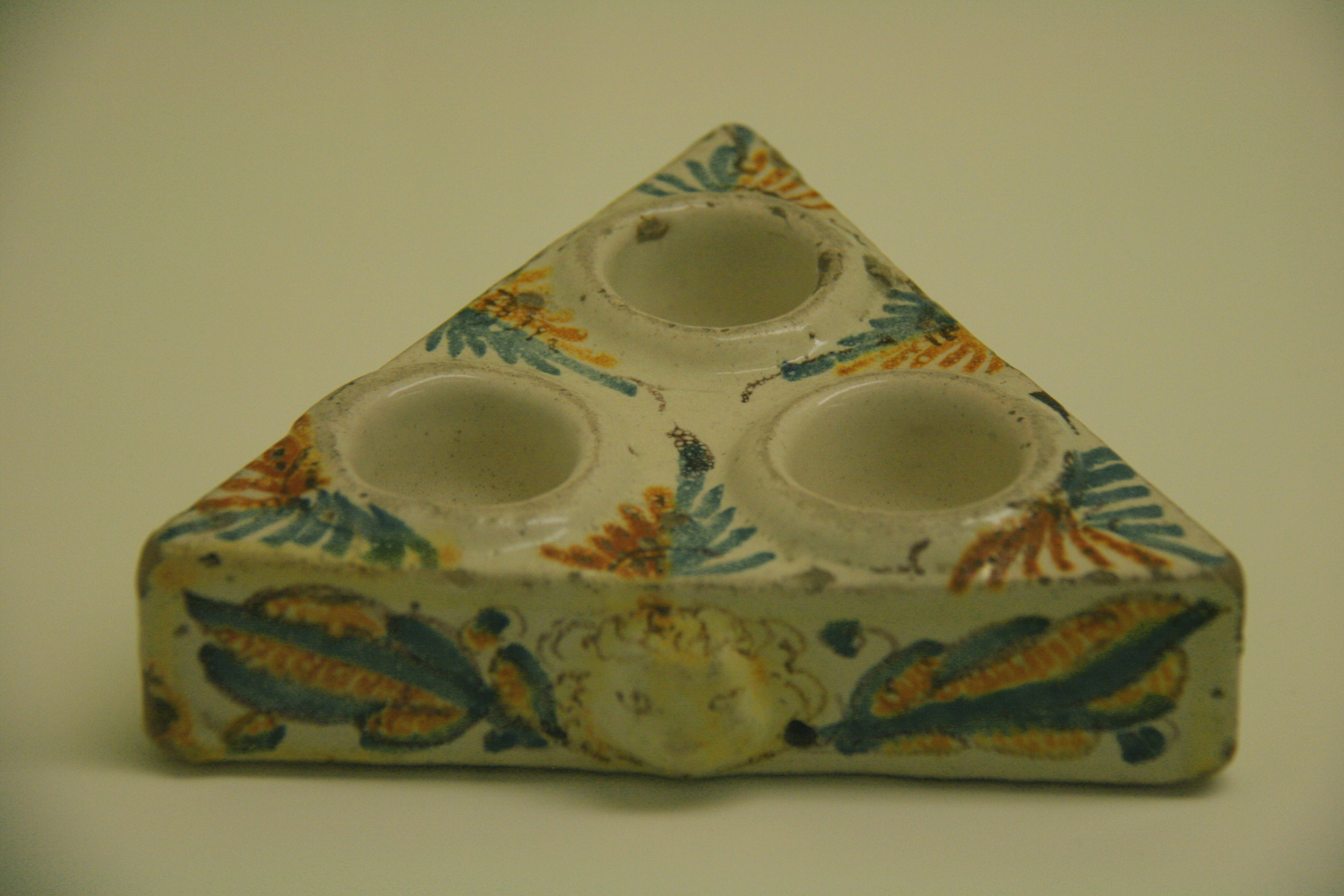 Salero de Villafeliche (Zaragoza) o alfar zaragozano